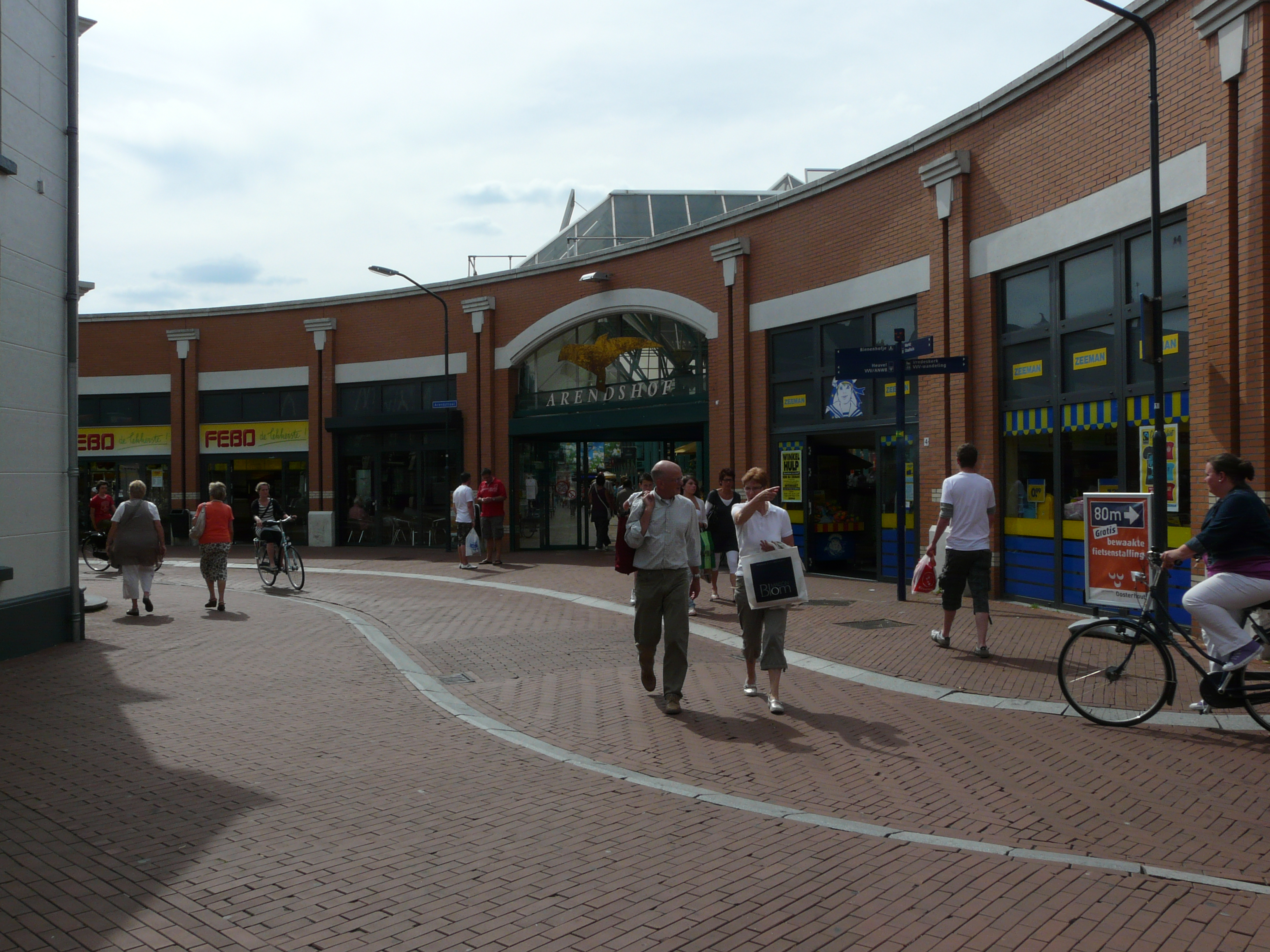 Zicht op een deel van het Winkelcentrum Arendshof in Oosterhout